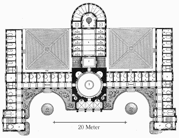 Grundriss des Vierordtbades